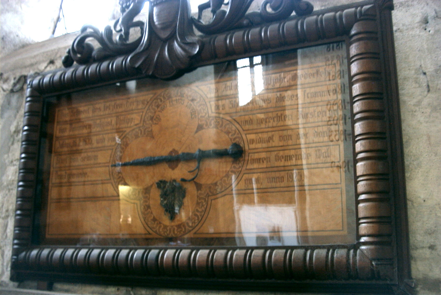 Schauvitrine in Petrikirche Wolgast